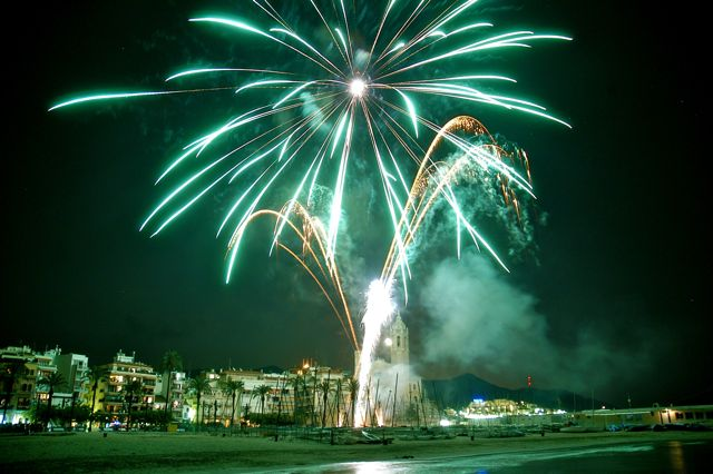 Castell de focs d'artifici de la Festa Major de Sant Bartomeu a Sitges